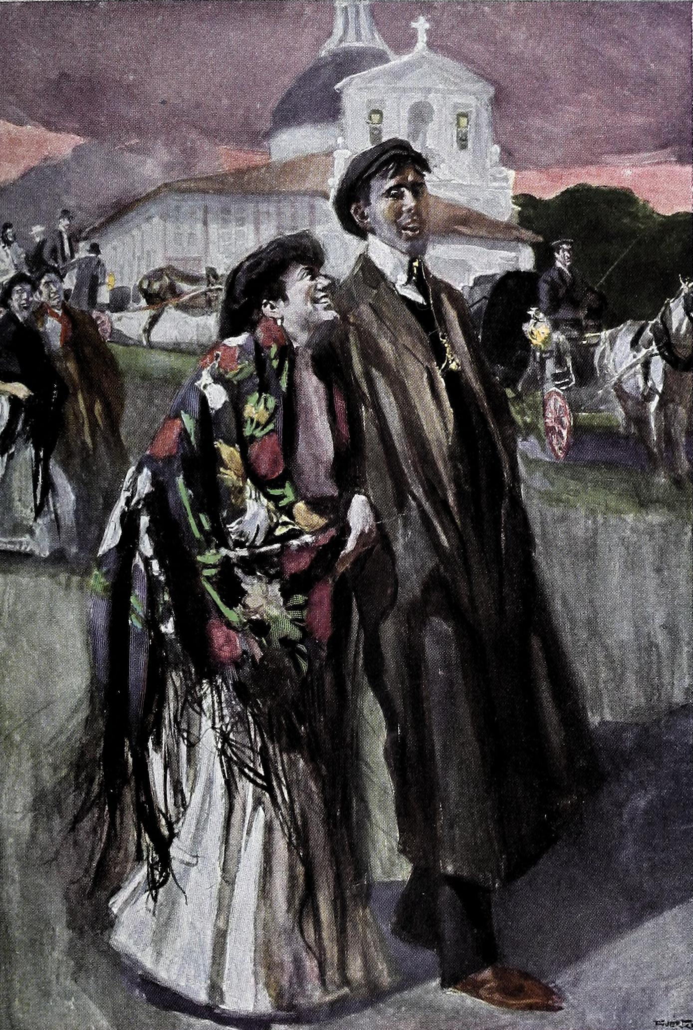 En San Isidro.